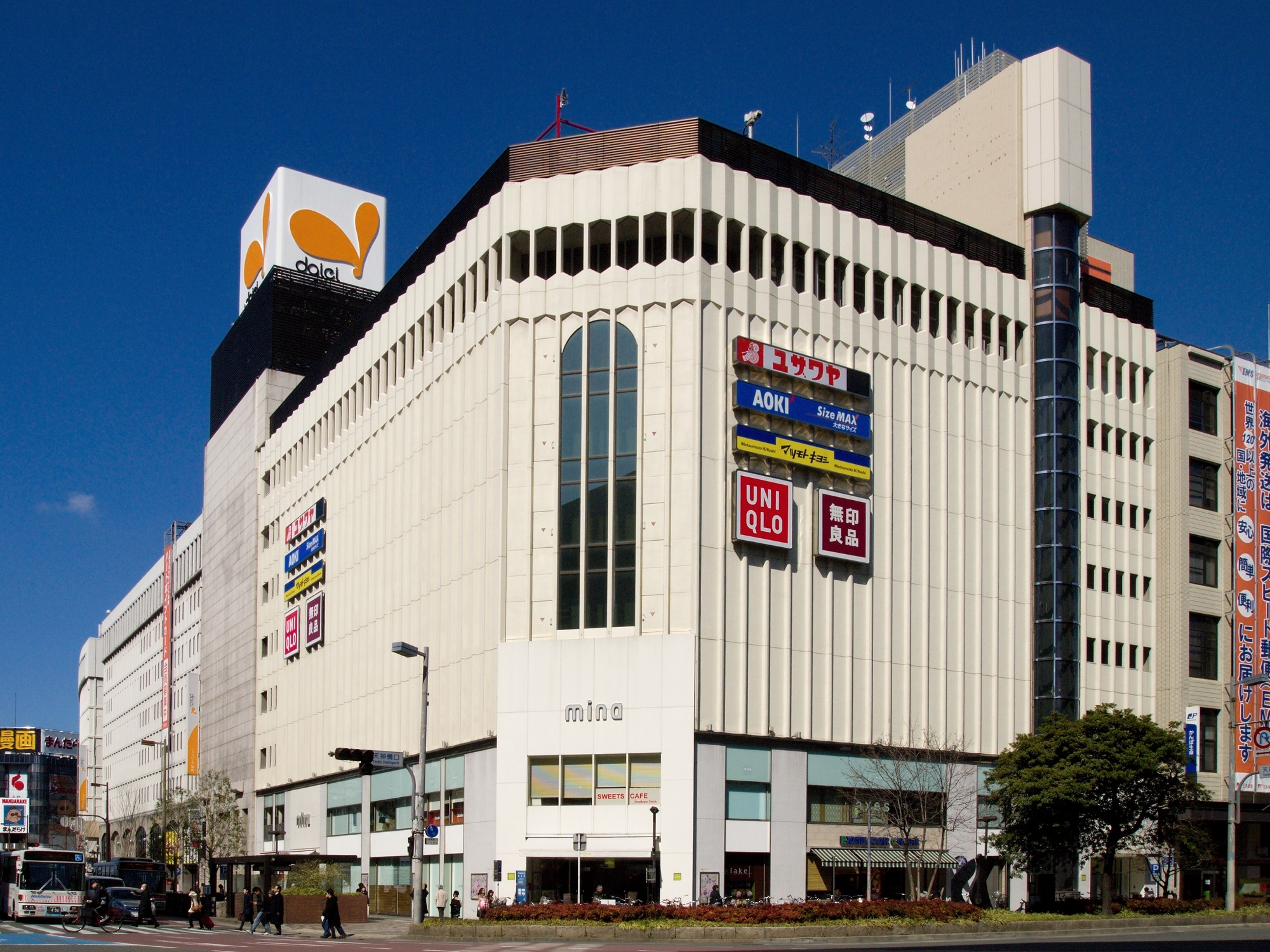 福岡県福岡市天神にある商業施設「ミーナ天神」と「ショッパーズ福岡」 ※Zoner Photo Studio 11にて色調および遠近感歪み補正後トリミング。